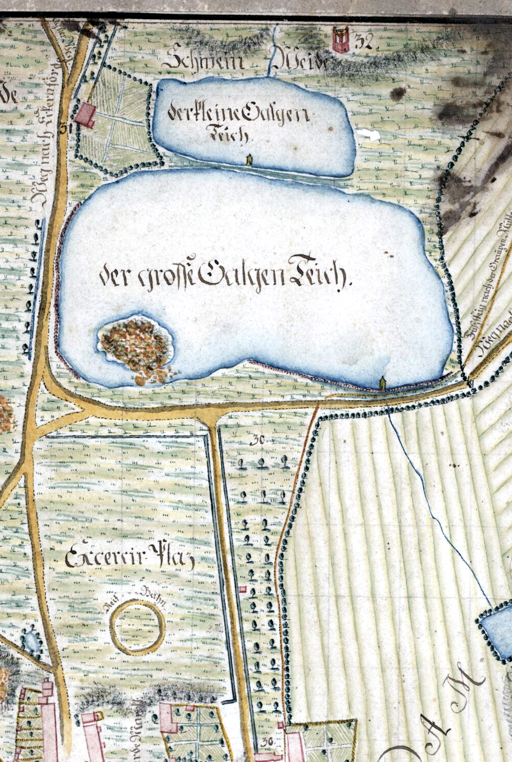 Grundt Riss von der Stadt Kiel mit dabeýliegenden Haafen und der umgrenzenden Gegend. verfertiget den 30ten Iunii im. Iahr 1786 von Christian Hermann Benedict Klessel